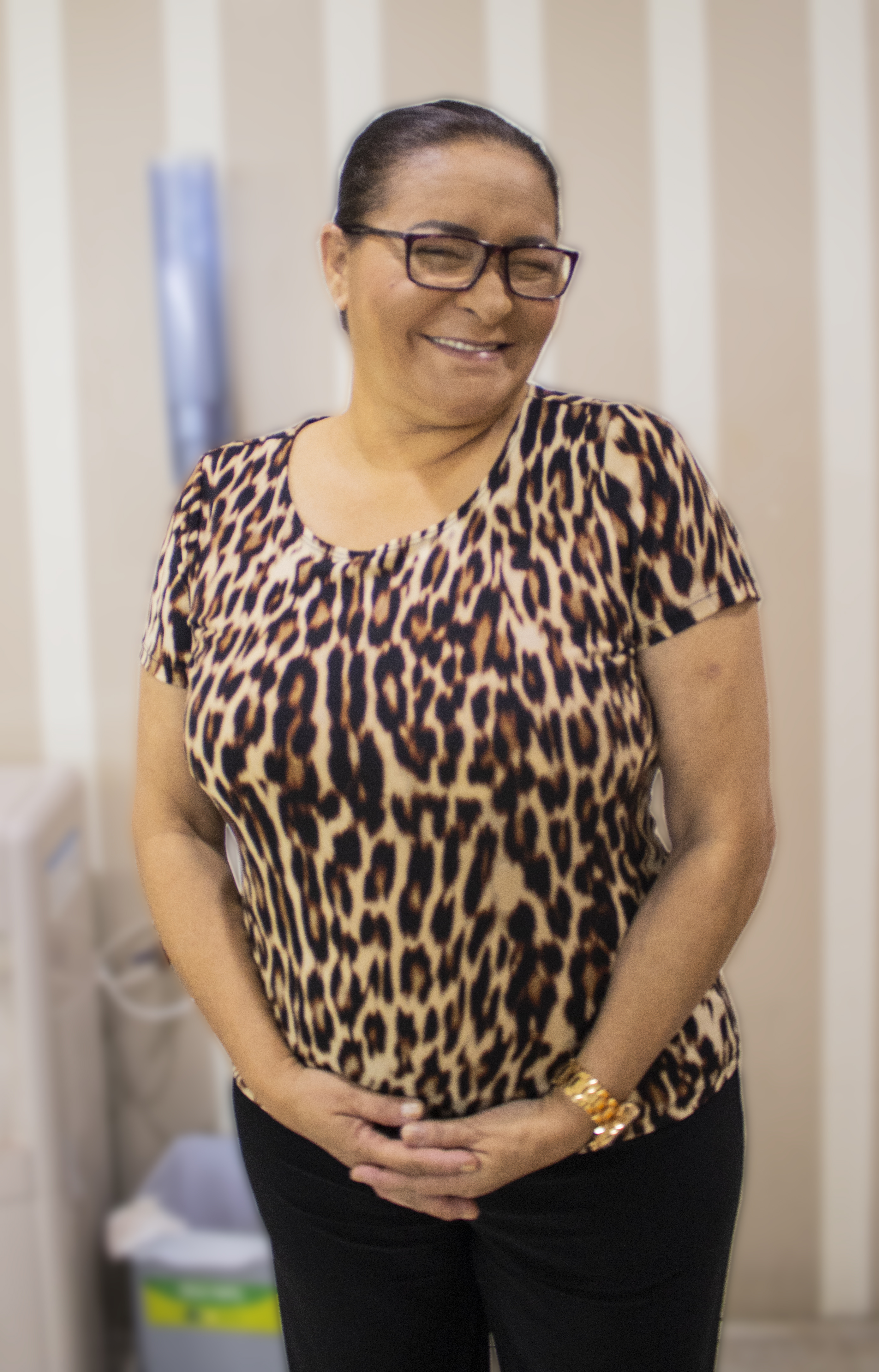 La actriz ecuatoriana Amparo Guillén en 2019.